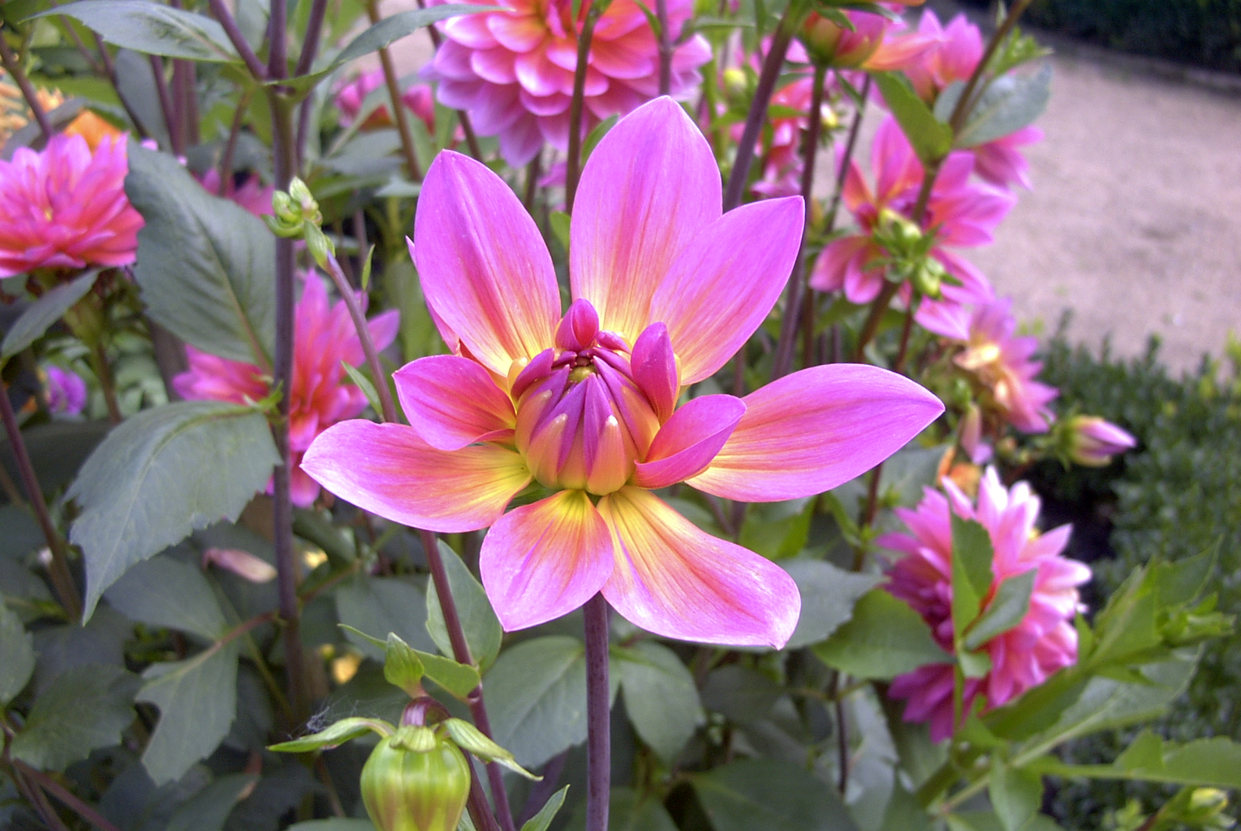 Dahlie